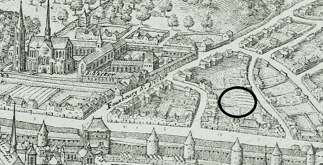 Sur le plan de Mérian, on peut voir que les arènes de Lutèce n'apparaissent pas : elles sont ensevelies